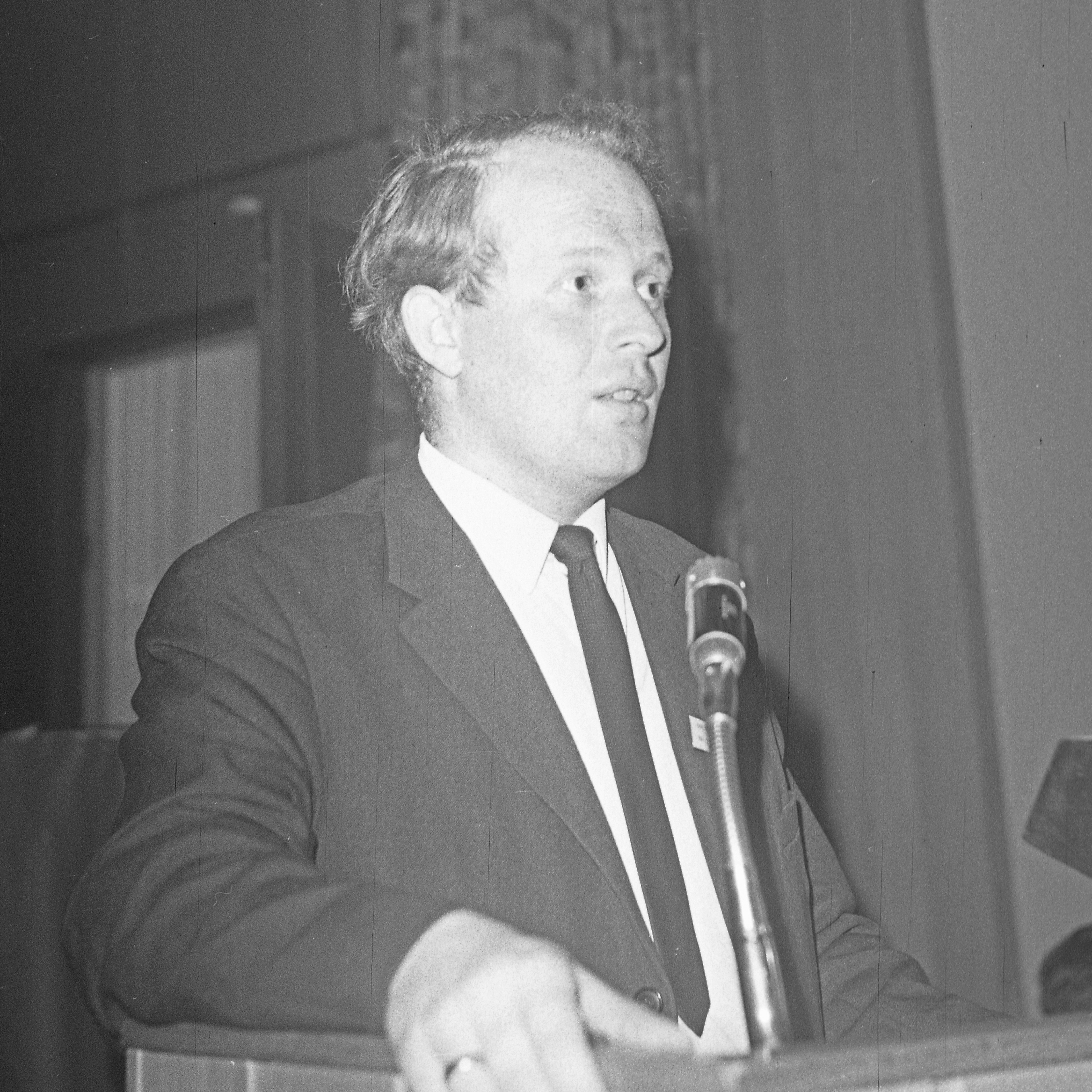 Format: 120 mm sort/hvitt negativ [utsnitt] Dato / Date: Juni 1970 Fotograf / Photographer: Eirik Sundvor (1902 - 1992) Sted / Place: Norges Unge Venstres landsmøte i Bergen Oppdatert / Update: 14.07.2014 (utsnitt) Wikipedia: Odd Einar Dørum (f. 1943) Eier / Owner Institution: Trondheim byarkiv, The Municipal Archives of Trondheim Arkivreferanse / Archive reference: Tor.H43.B78.F18007 Merknad: Kjell G. Rosland gikk av og Odd Einar Dørum ble valgt som ny leder i Norges Unge Venstre ved landsmøtet i Bergen 29 juni 1970.